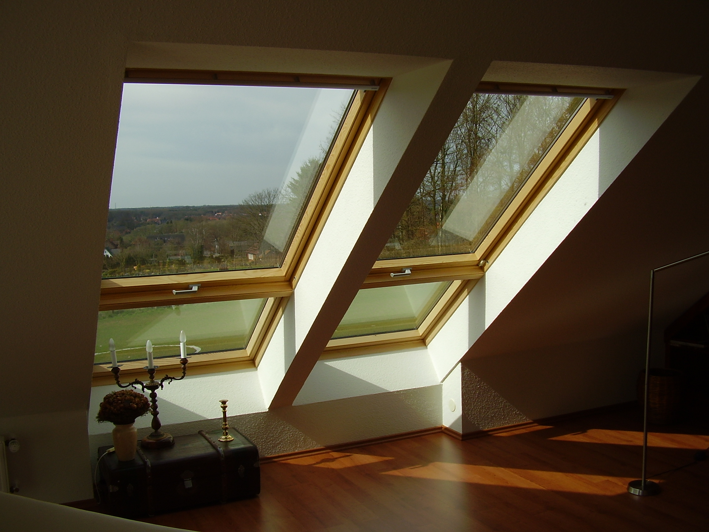 Velux-Dachfenster